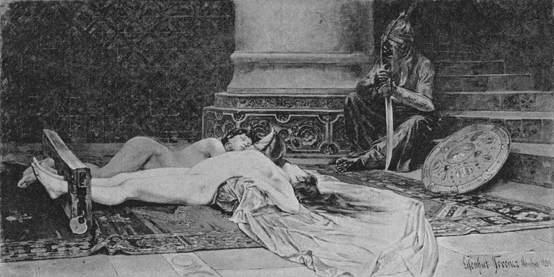 Vor dem Urteil